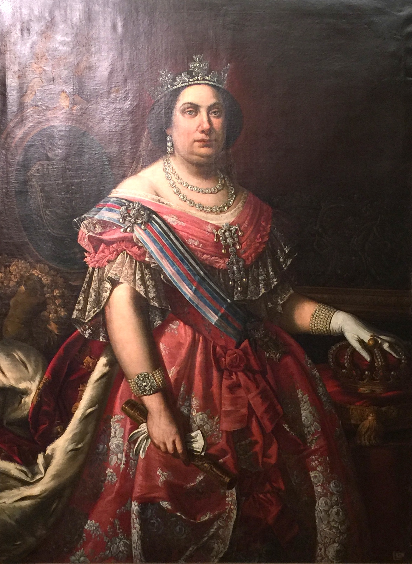 Museo de bellas artes de Castellon